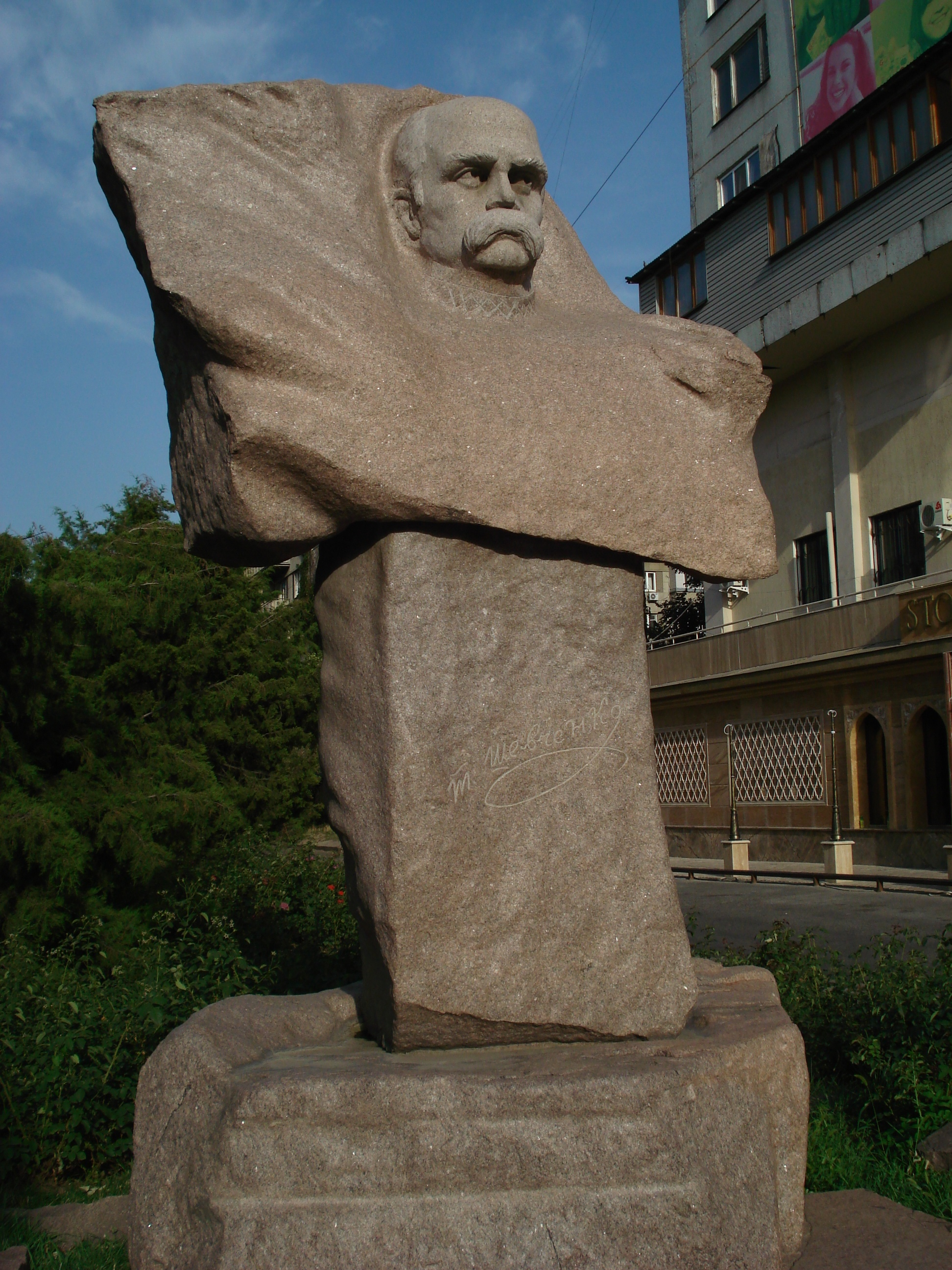 Памятник Тарасу Шевченко в городе Алматы